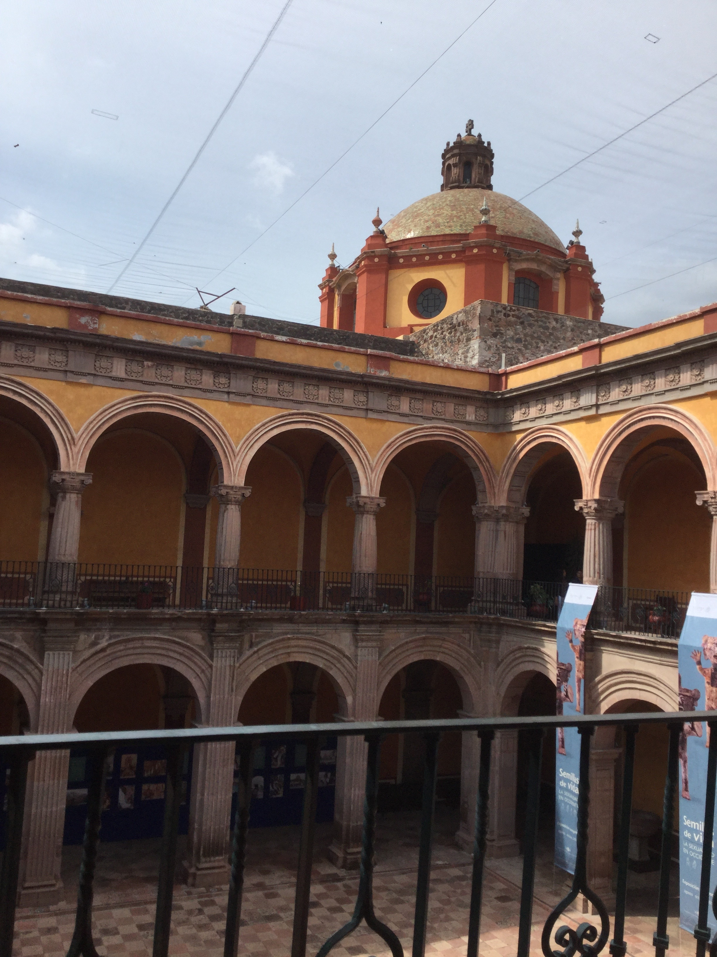 Vista de la fachada interior del Museo Regional de Querétaro desde el segundo piso, del lado contrario a la entrada.